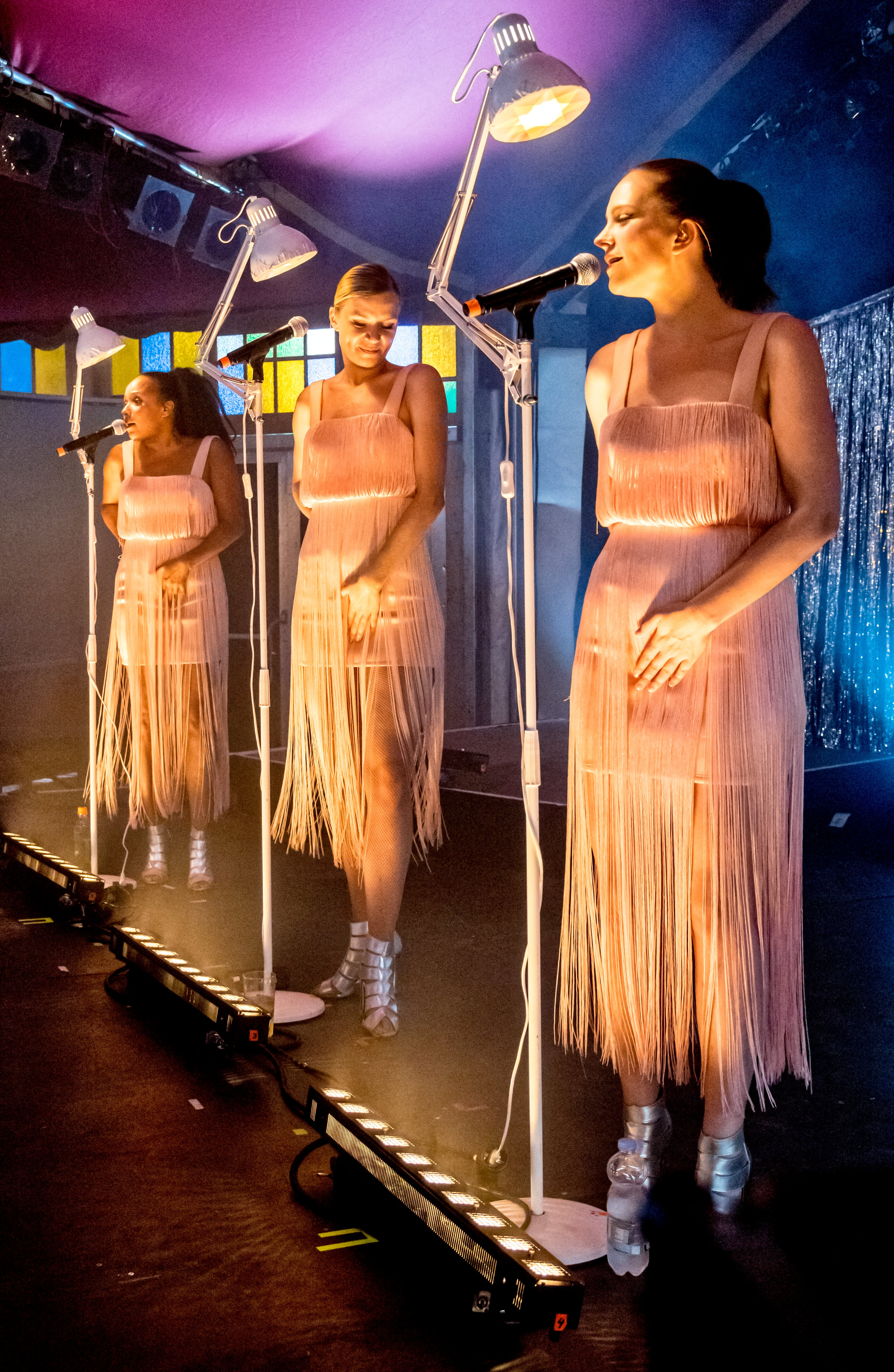 Bilder vom Zelt Musik Festival 2019 in Freiburg im Breisgau